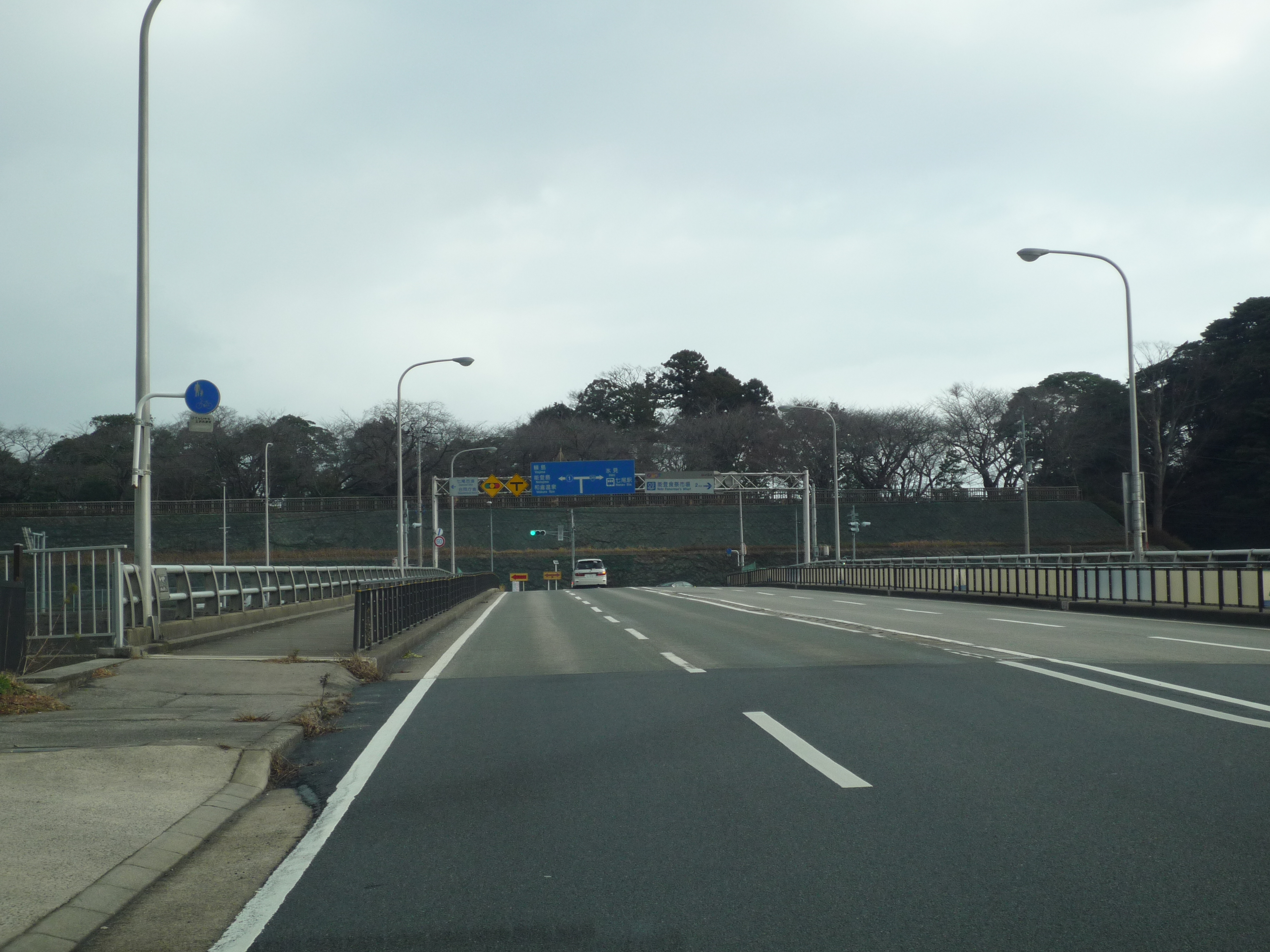 komaruyama castle